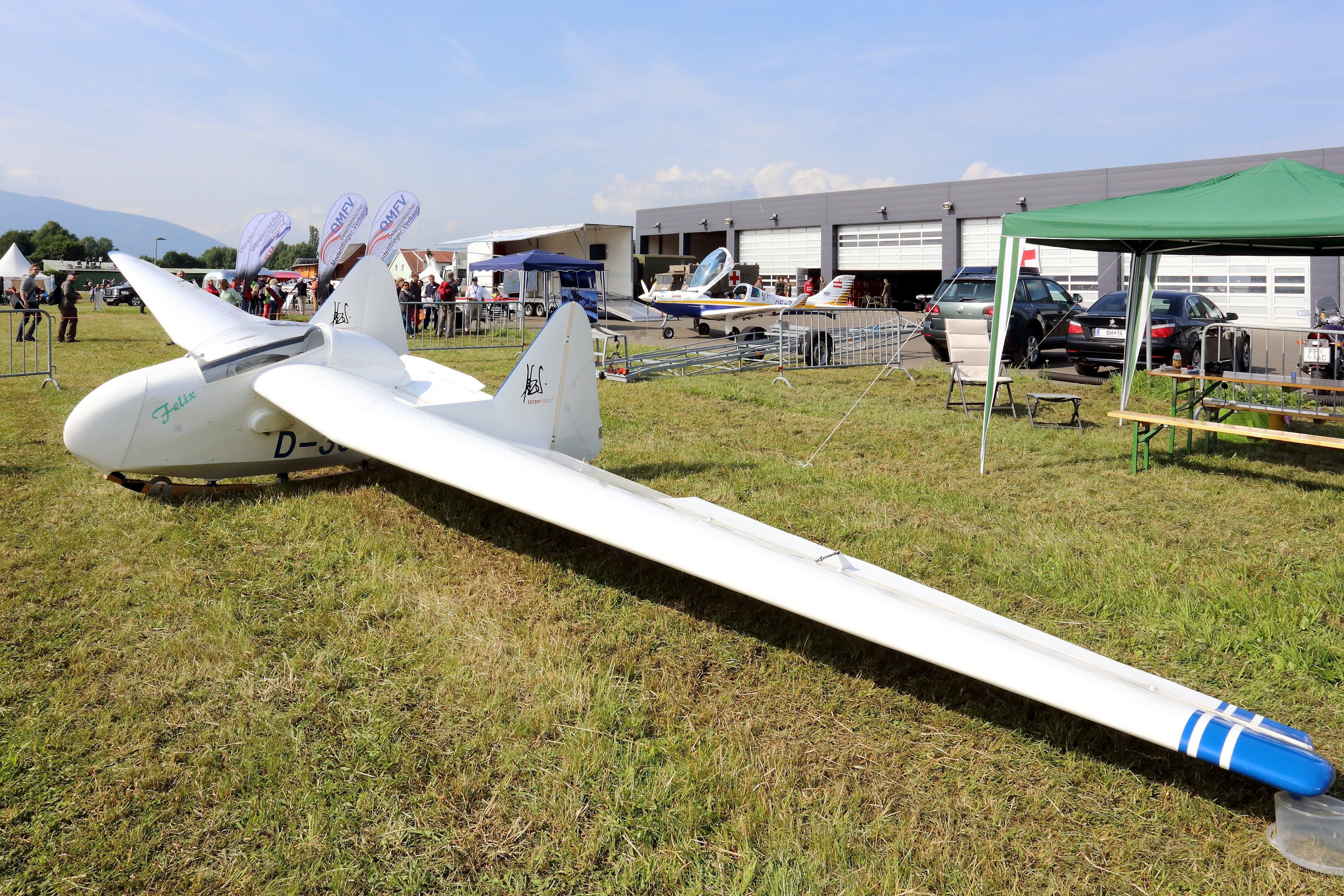 Einsitziges, schwanzloses Segelflugzeug Fauvel AV-36. Das Flugzeug ist eine Holzkonstruktion, hat eine Spannweite von etwa 12 m, eine Rüstmasse von rund 125 Kg und eine Sinkgeschwindigkeit von 0,82 m bei 75 km/h. Es ist wohl der bekannteste Nurflügler des französischen Konstrukteurs Charles Fauvel (1904–1979), den er Anfang der 1950er Jahre mit seinem Sohn Jean entwarf. Bis 1959 wurden über 100 Exemplare in verschiedenen Ländern gebaut, unter anderem ab 1955 in Lizenz von H. Frebel Flugzeugbau, Nabern/Teck.